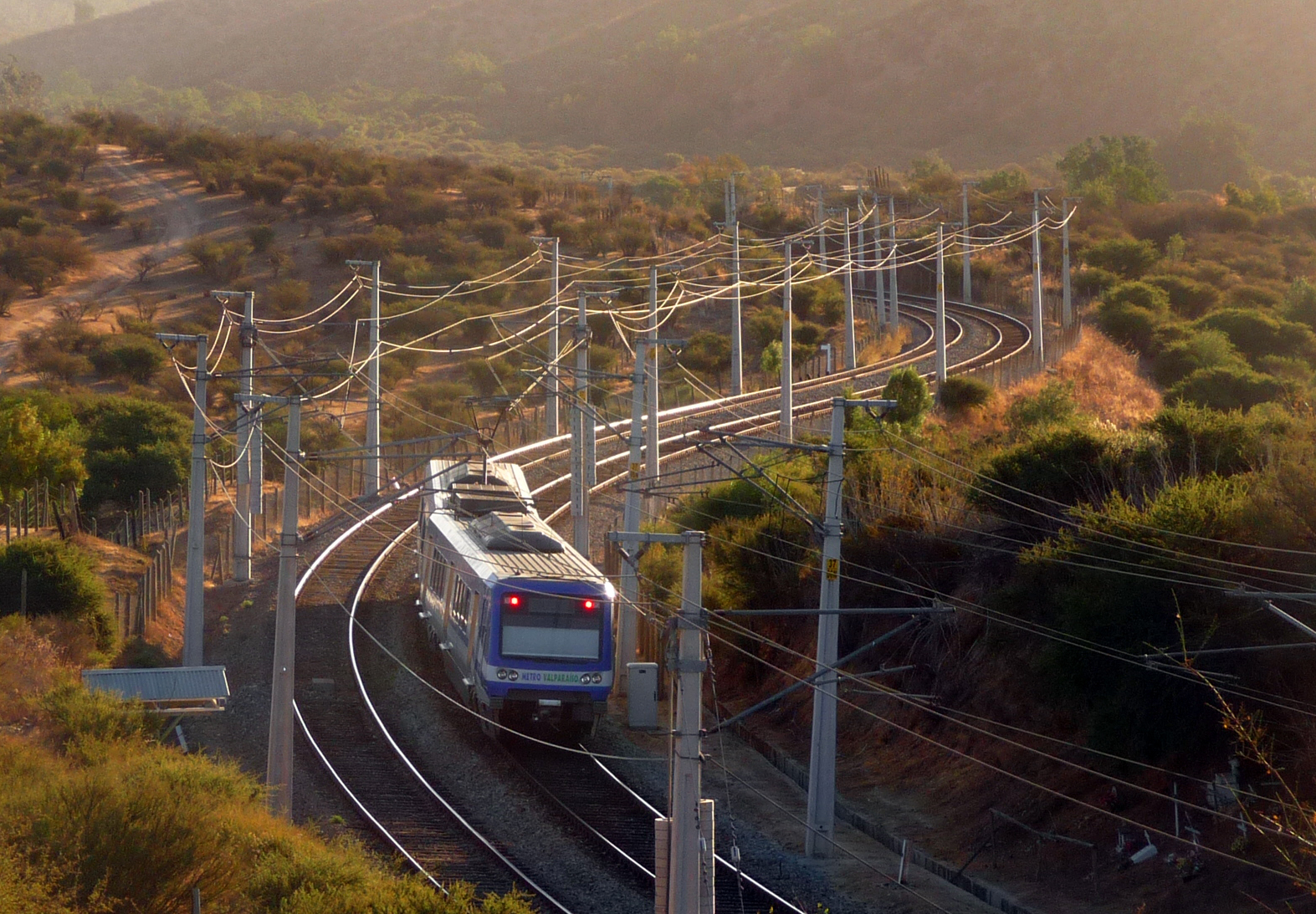 Queronque.